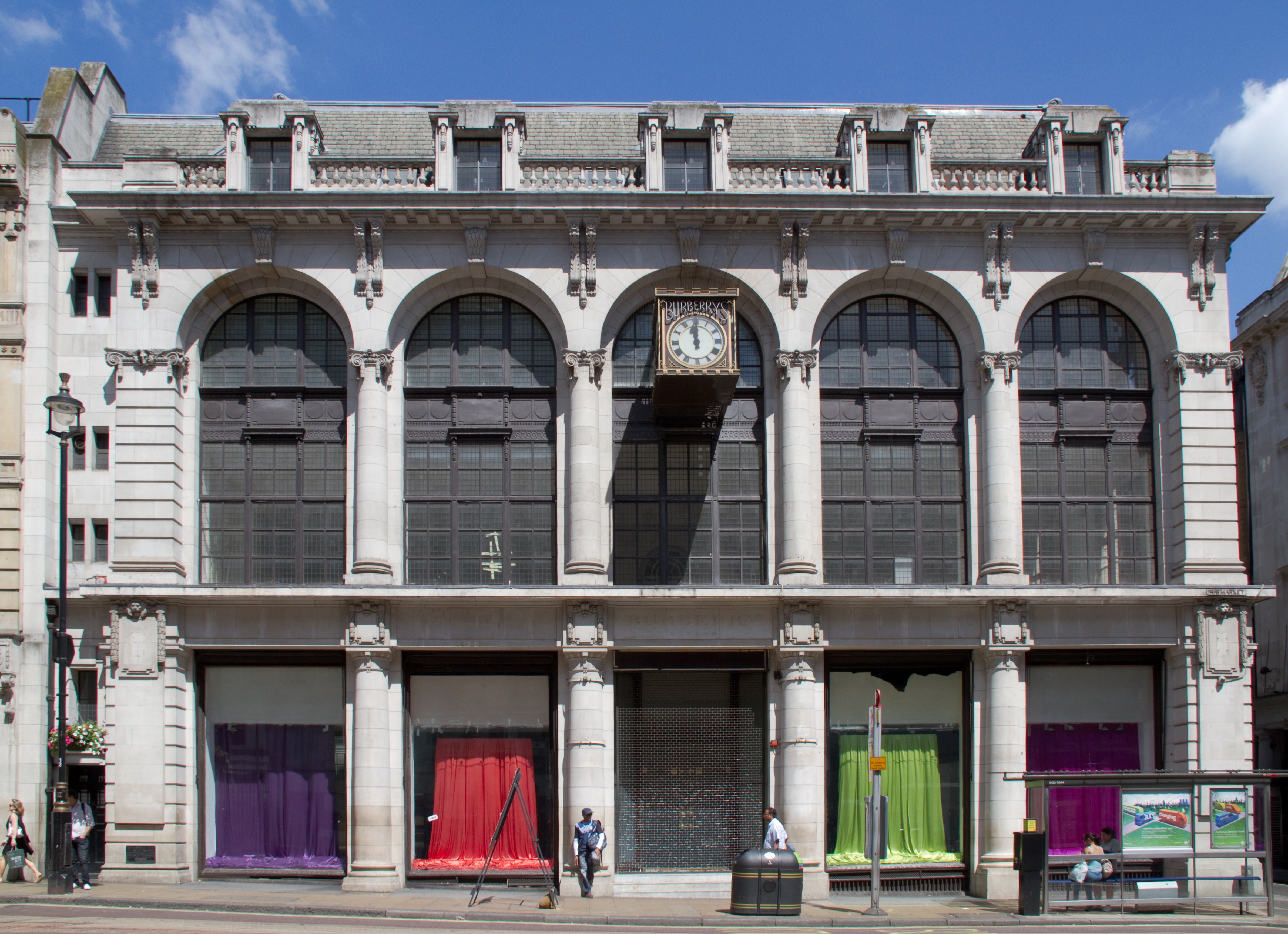 Burberrys